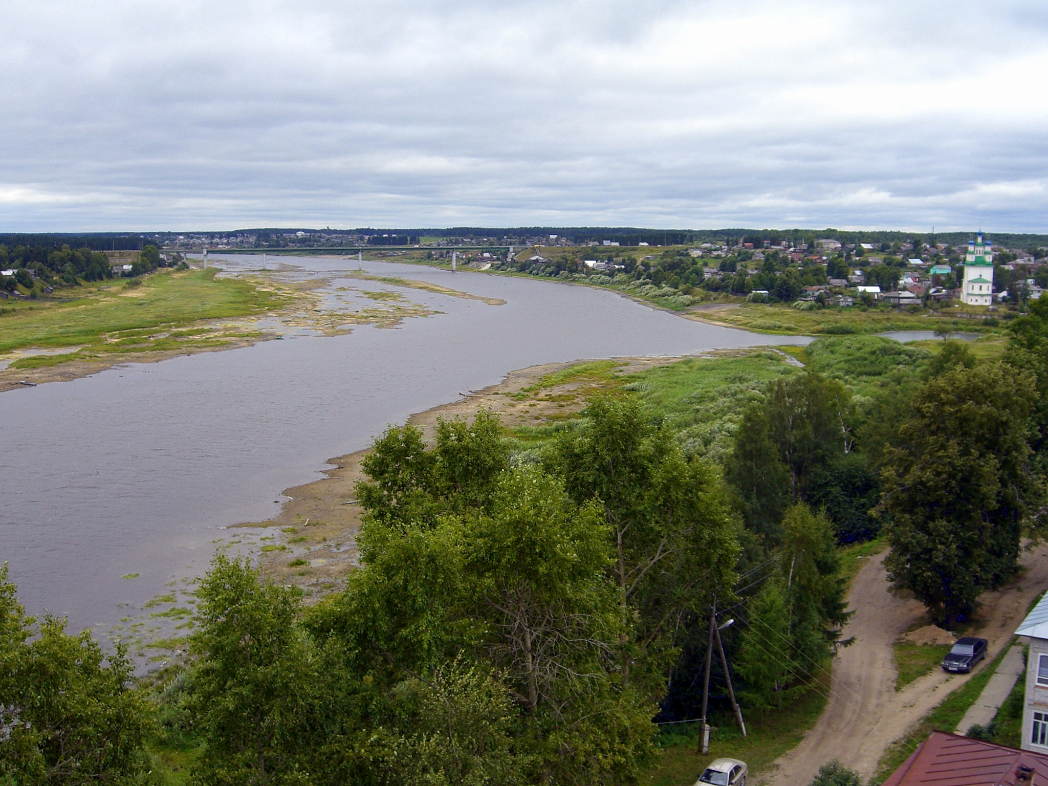 Fluss Suchona bei Totjma